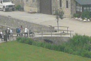 Pontet de Sant Gil (Queralbs)